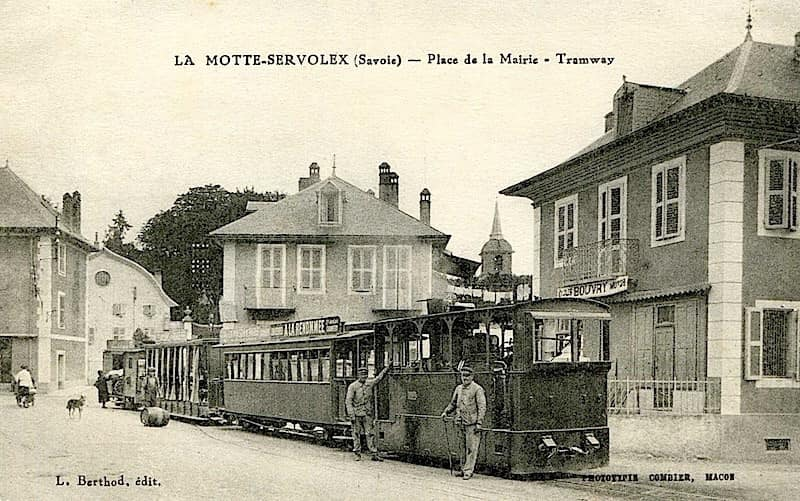 La Motte-Servolex (Savoie) - Place de la Mairie - Tramway (L. Berthod, edit - Photograpie Combier, Macon)